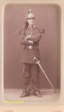 militaire du 6eme dragons en tenue - Joigny vers 1884